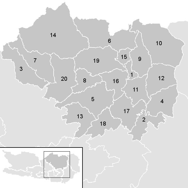 Leere Karte mit den Gemeinden im Österreichischen Bezirk Sankt Veit an der Glan